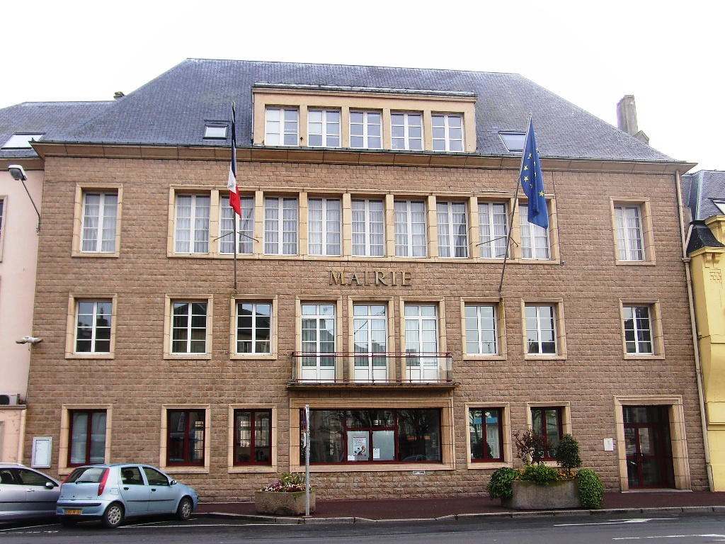 L'hôtel de ville de Granville (50)